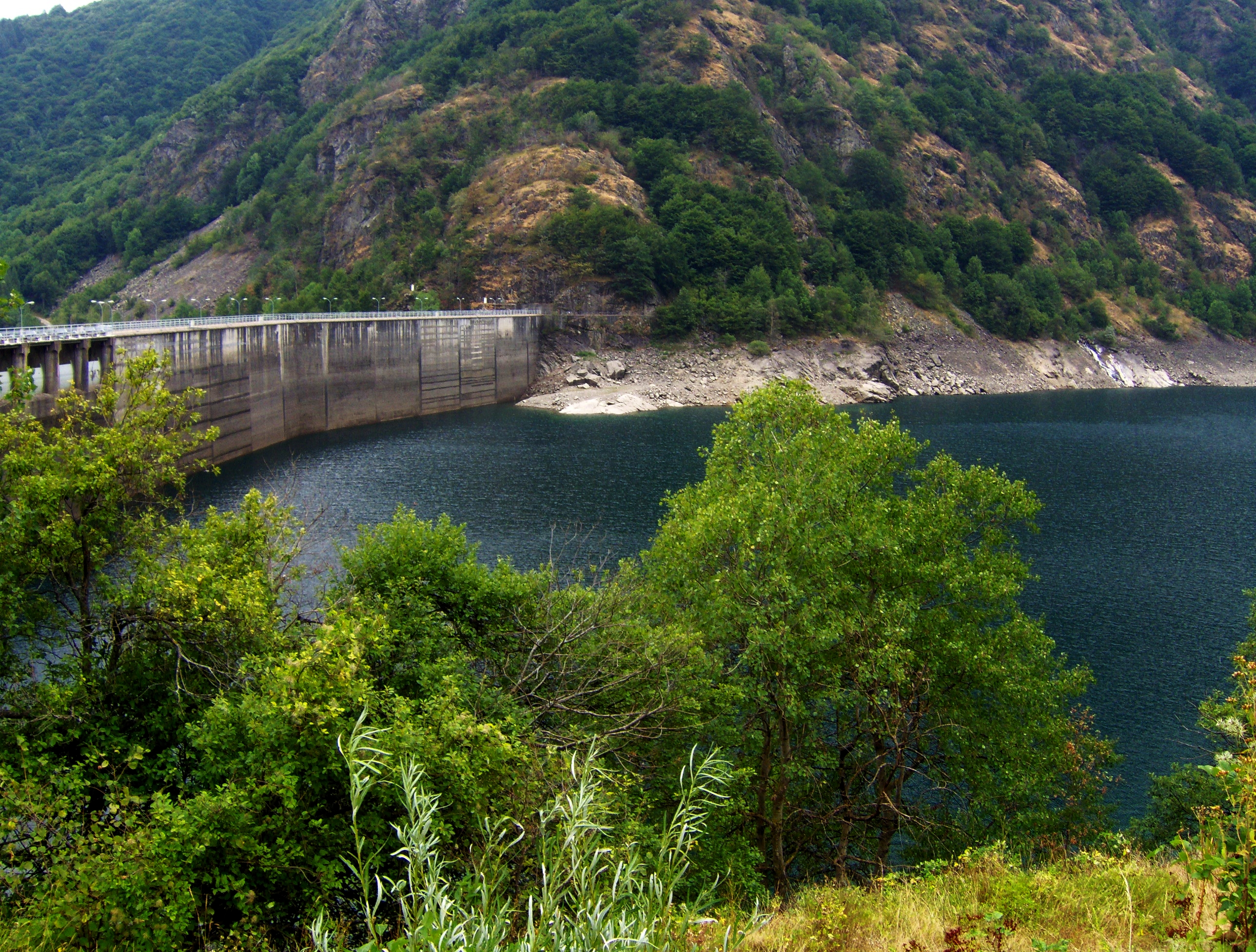 Entracque, Diga della Piastra e Lago della Piastra